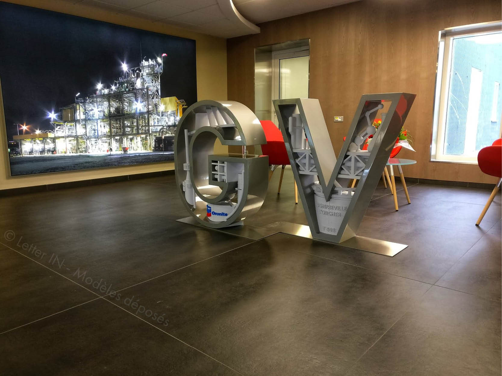 Oeuvre GV Gonfreville-L'orcher en impression 3D par Letter IN